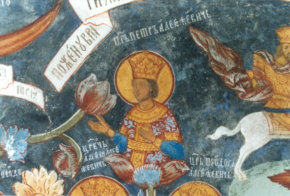 Комплекс церкви Ильи Пророка (Ярославская область, Ярославль, Советская площадь)